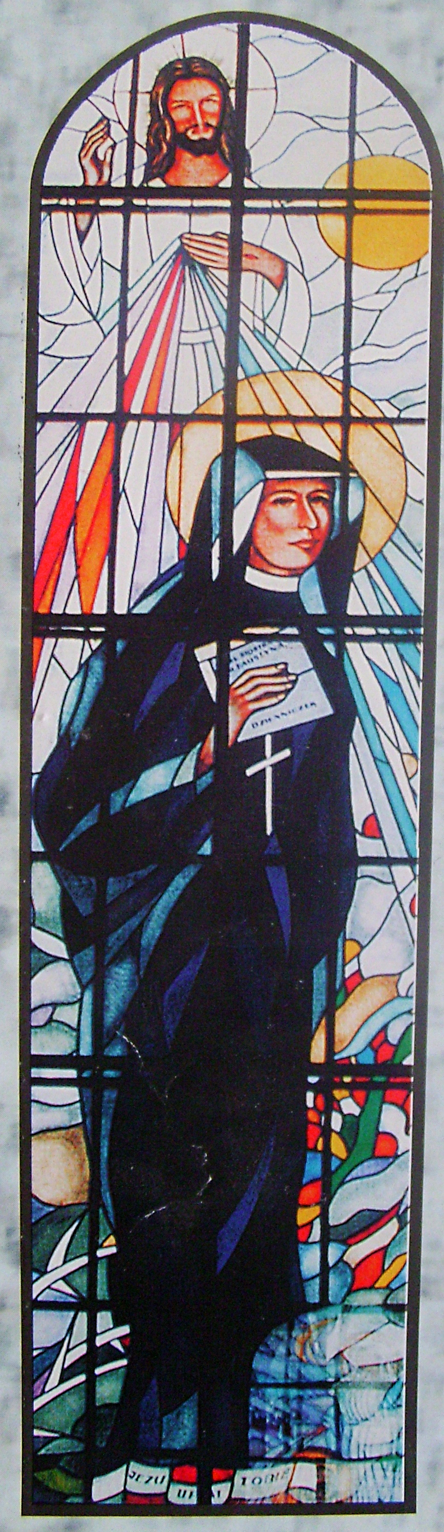 św. Faustyna Kowalska - witraż w kościele Imienia Maryi w Bączalu Dolnym (diecezja rzeszowska)